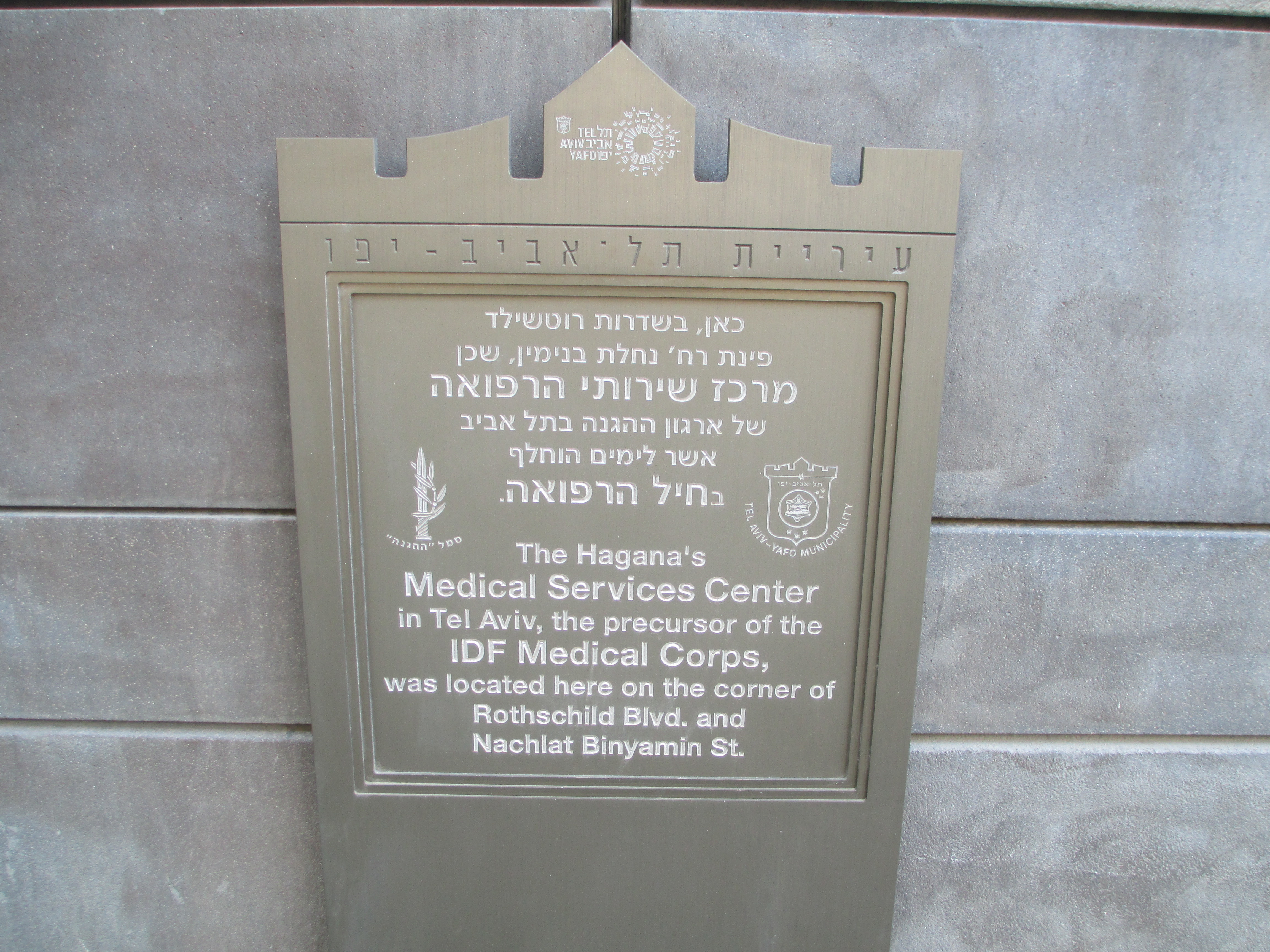 לוחית זיכרון למרכז שירותי הרפואה של ההגנה ברחוב נחלת בנימין מס' 24